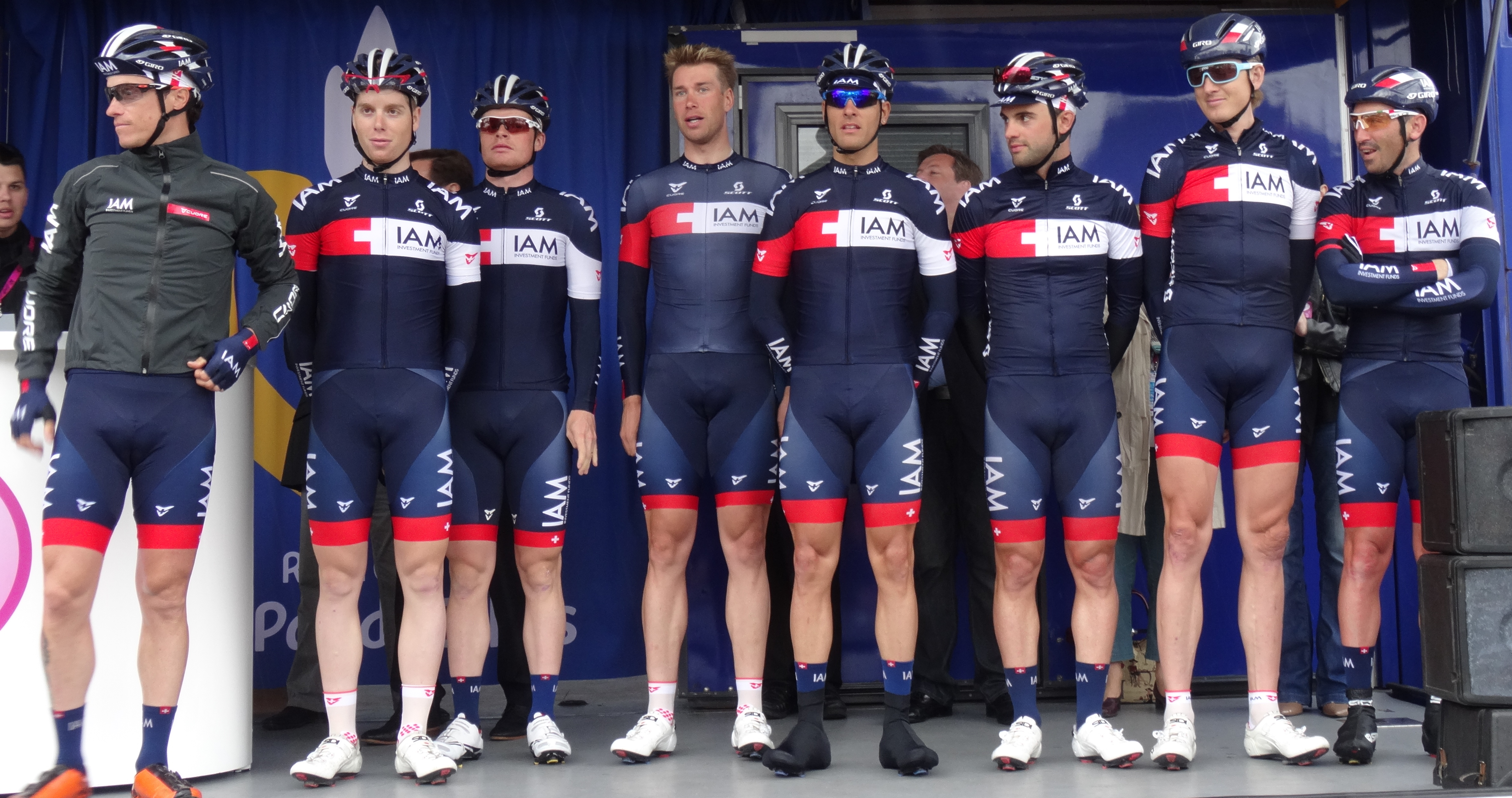 Reportage photographique réalisé le jeudi 8 mai 2014 au départ de la deuxième étape de l'édition 2014 des Quatre jours de Dunkerque à Hazebrouck, Nord, Nord-Pas-de-Calais, France. Depicted people: Sylvain Chavanel, Marcel Aregger, Dominic Klemme, Roger Kluge, Kevyn Ista, Gustav Erik Larsson, Matteo Pelucchi and Jérôme Pineau Depicted team: IAM